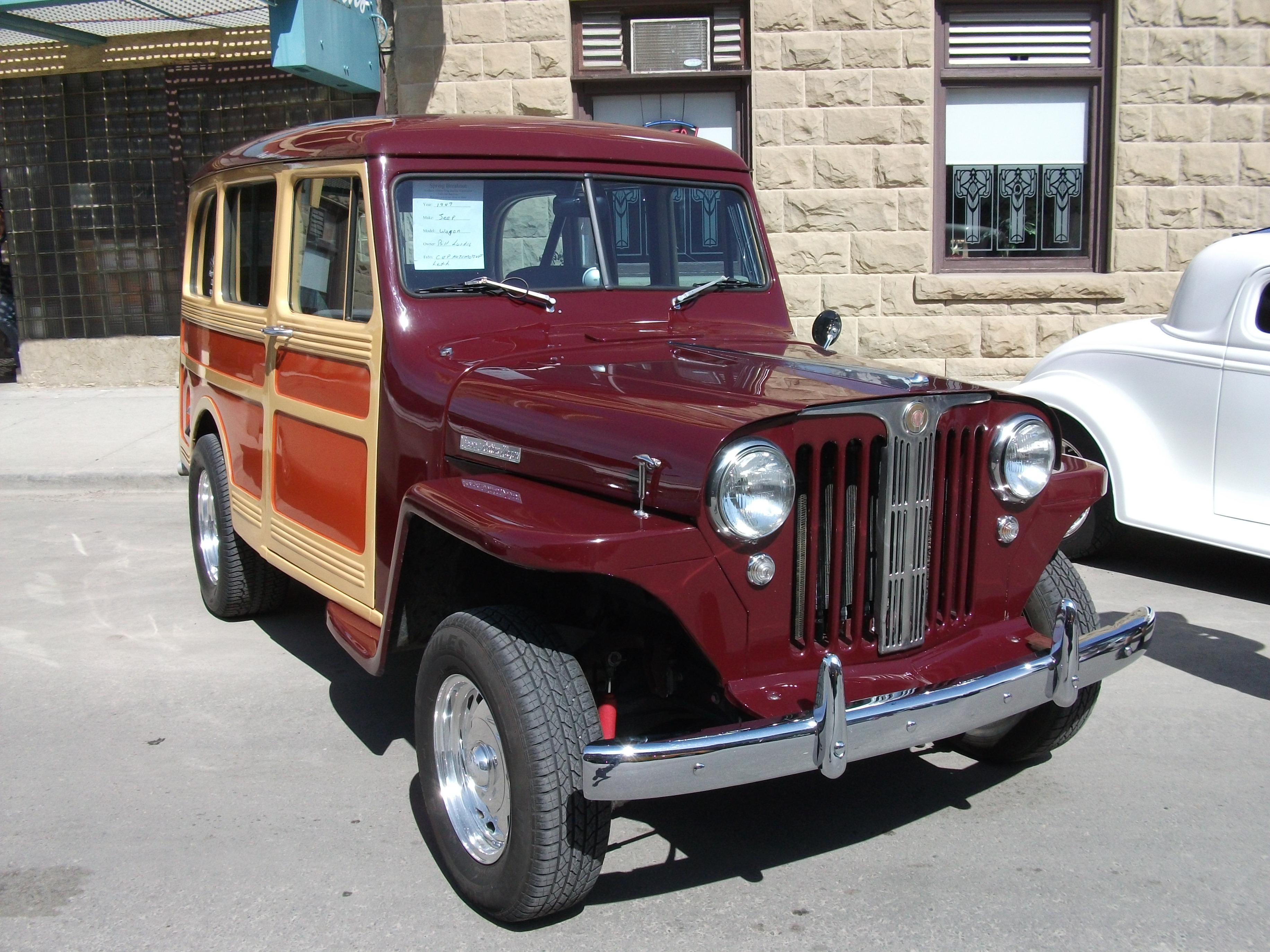 1947 Willys